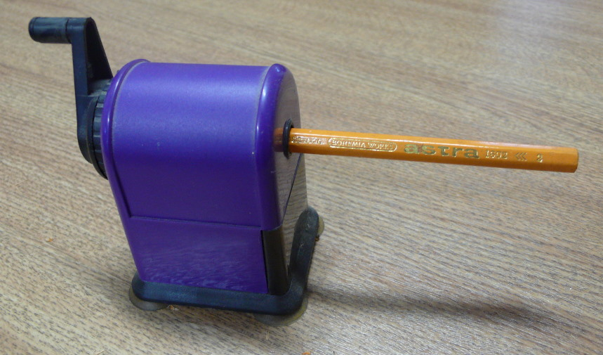 Bläistëftspëtzer